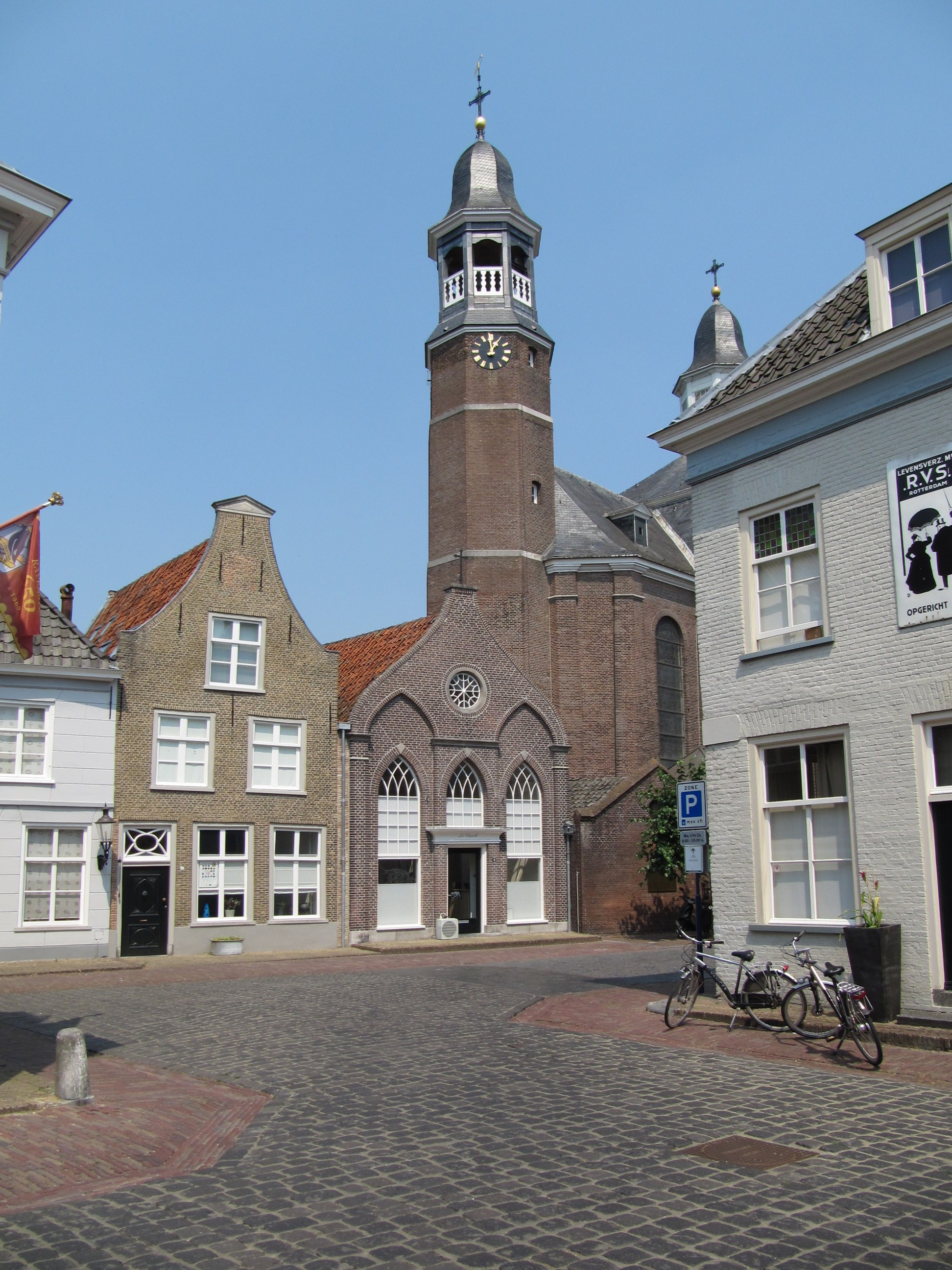 Ravenstein - Marktstraat en St Lucia.jpg, rijksmonument